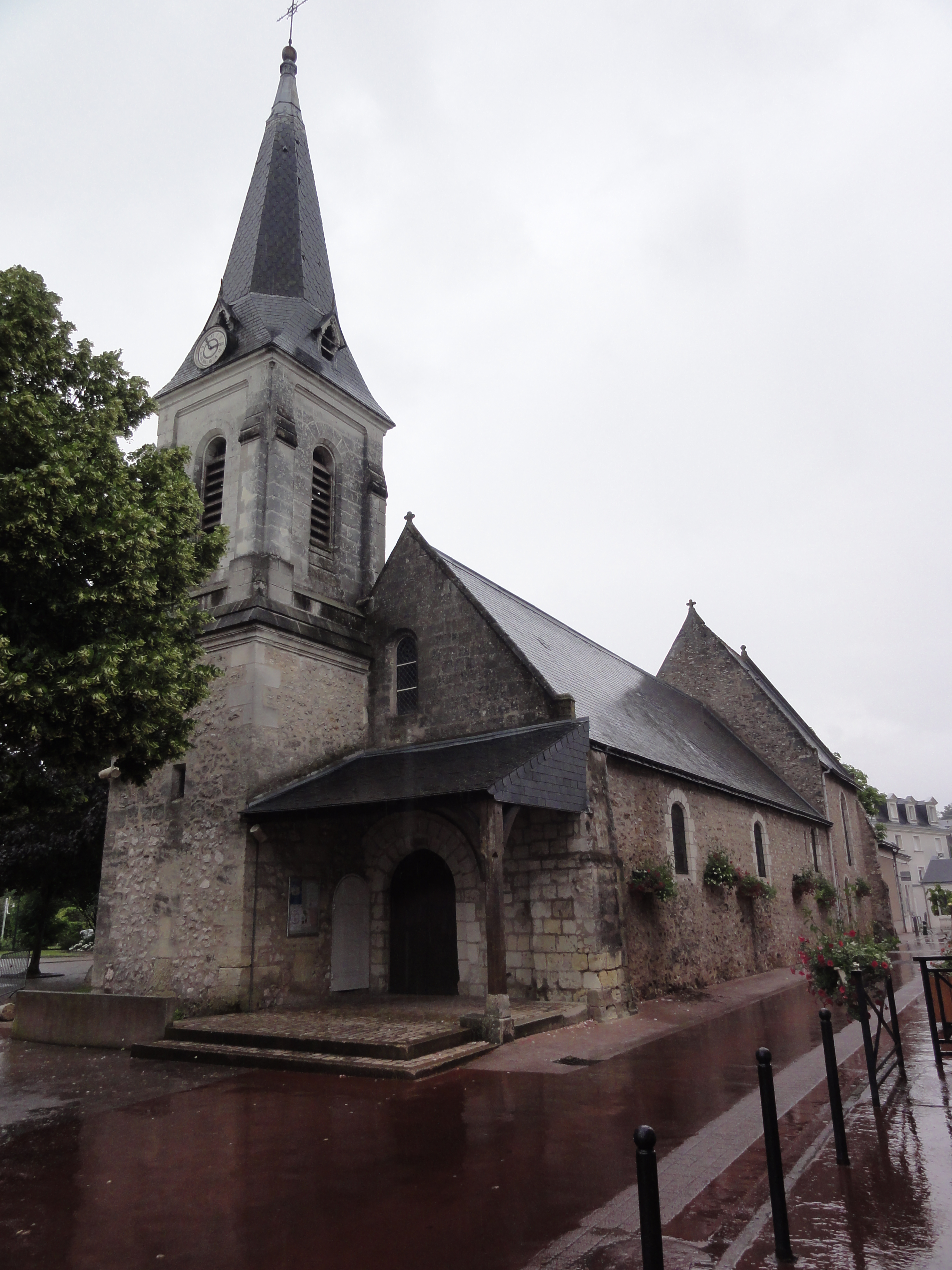 Église Saint-Symphorien de Chambray-lès-Tours (Indre-et-Loire)